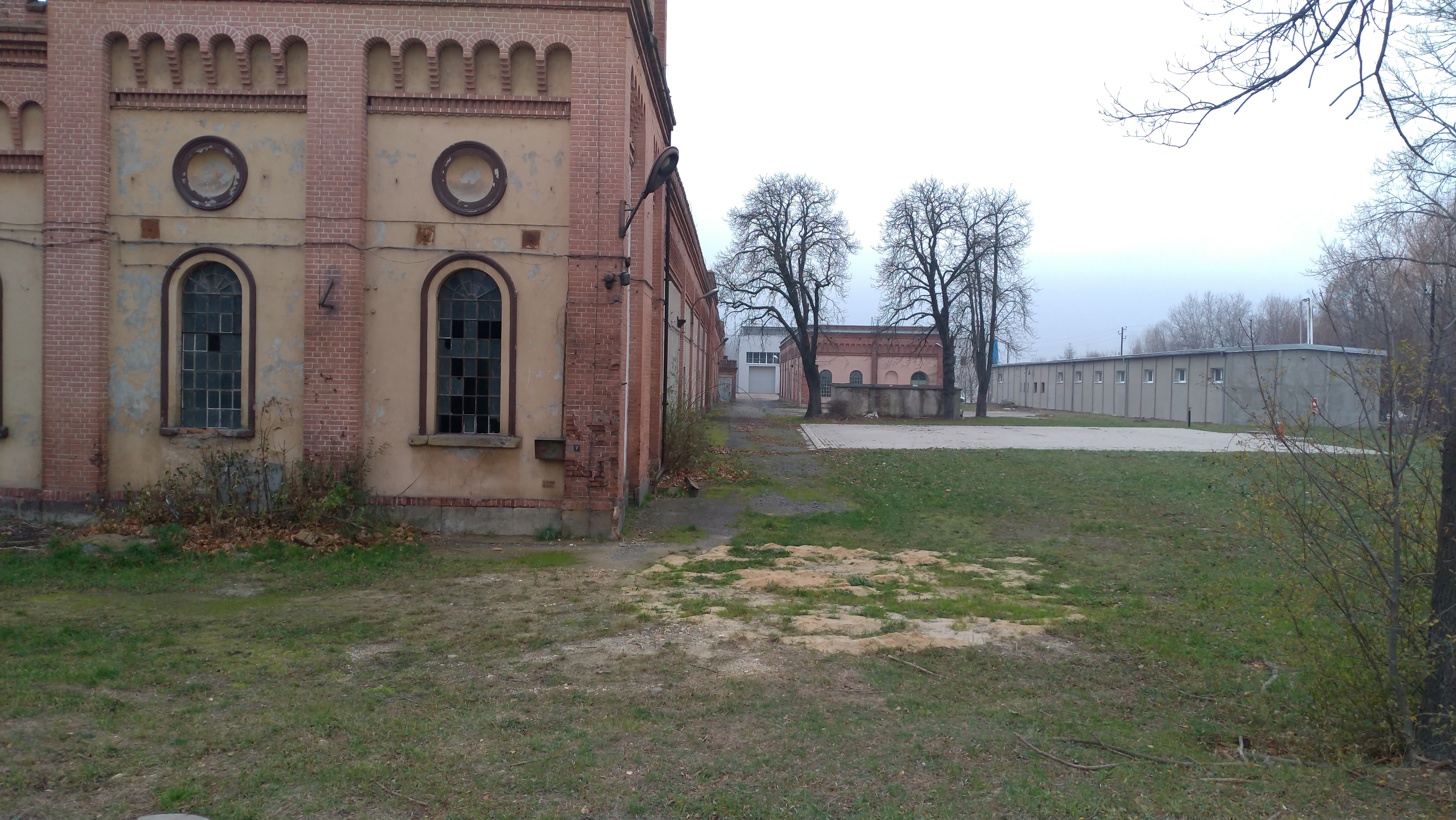 Farbiarnia Przędzy ZPB "Frotex" w Prudniku.